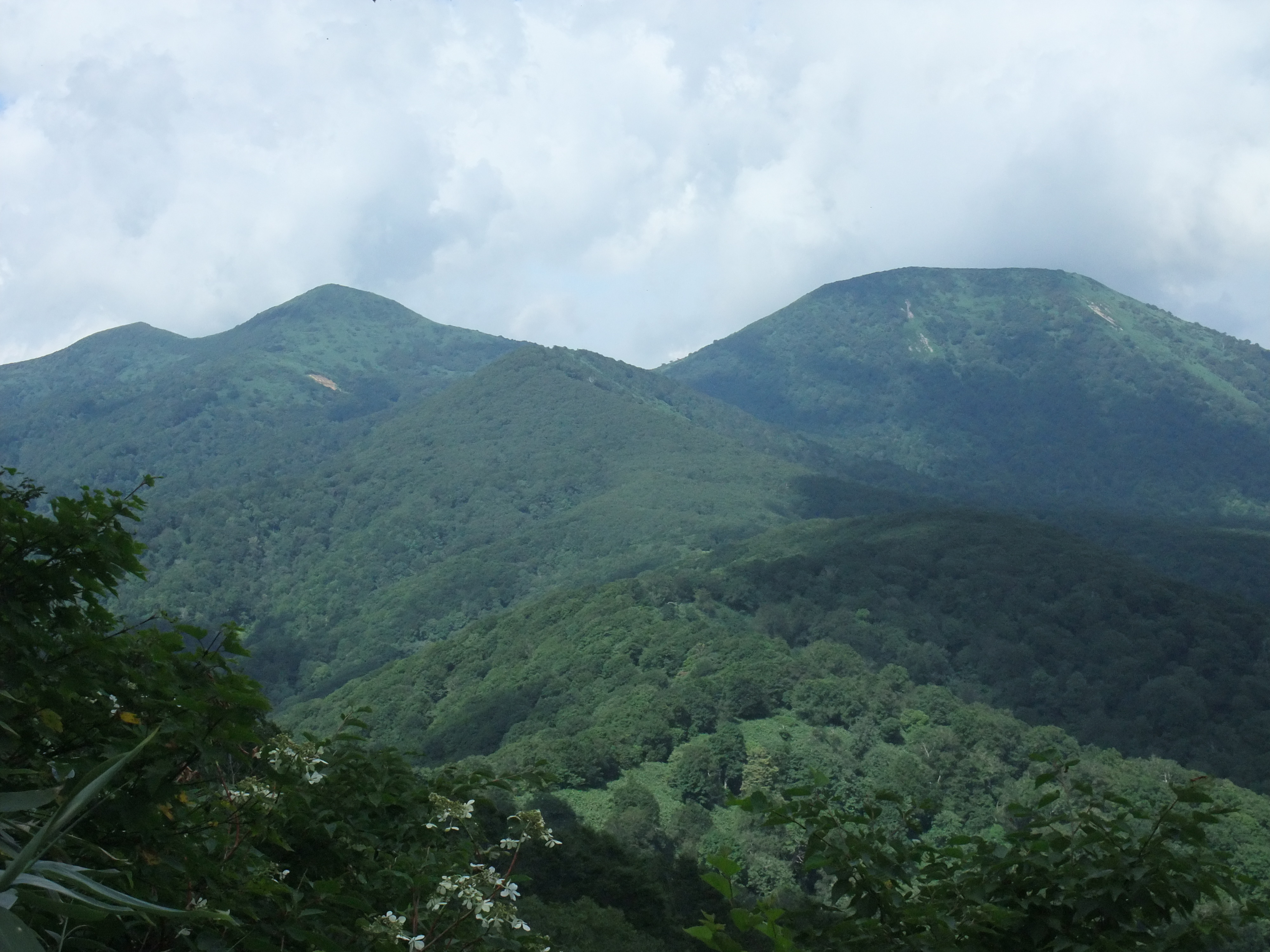 十和利山から見た青森県戸来岳（左側の三角形の山）と大駒ヶ岳（右側の山）